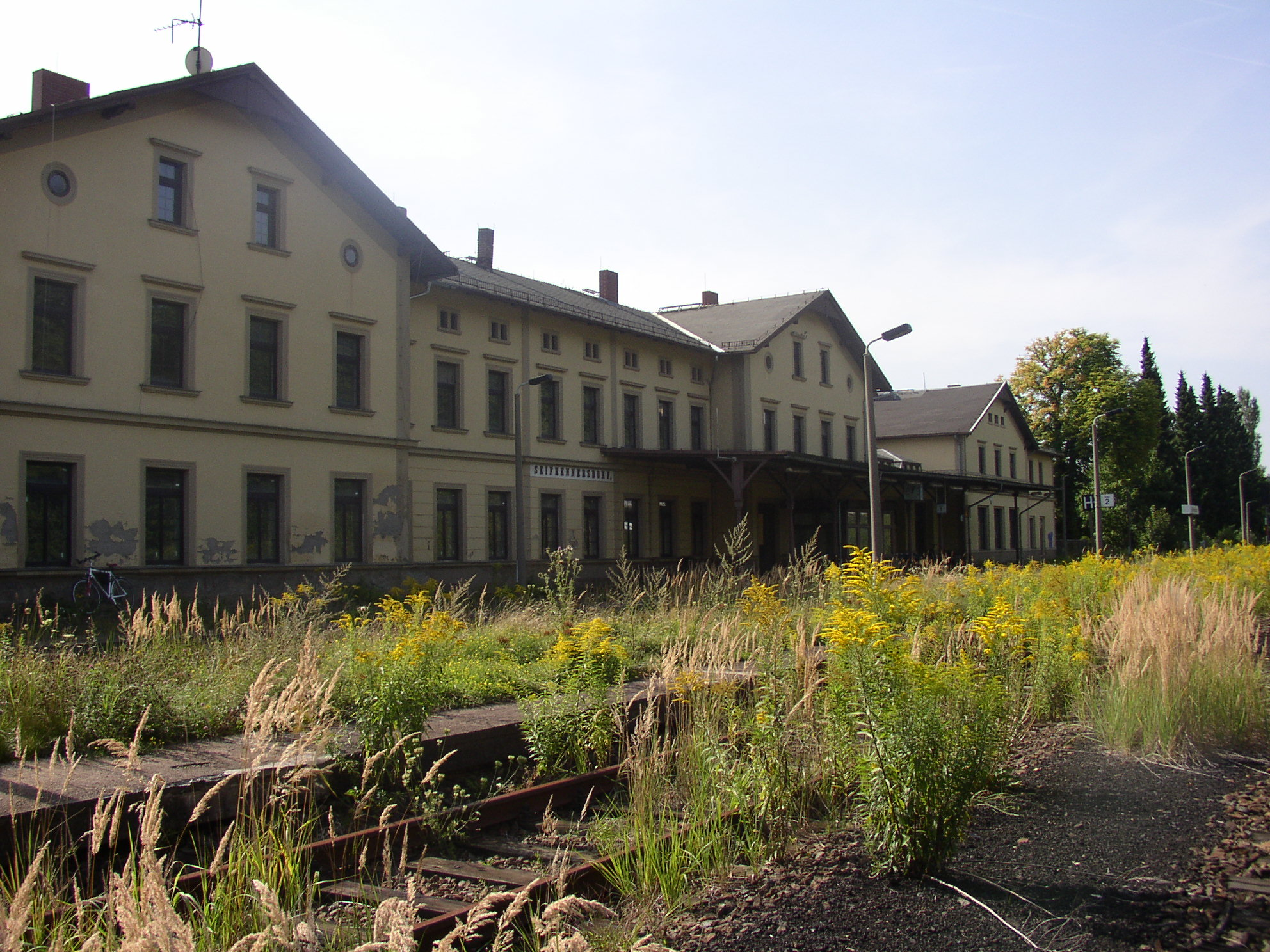 Bahnhof Seifhennersdorf, 22. August 2011